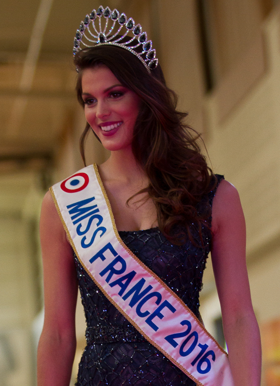 Iris Mittenaere, Miss France 2016 et Miss Univers 2016 à l'élection de Miss Yonne 2016, le 7 mai 2016.